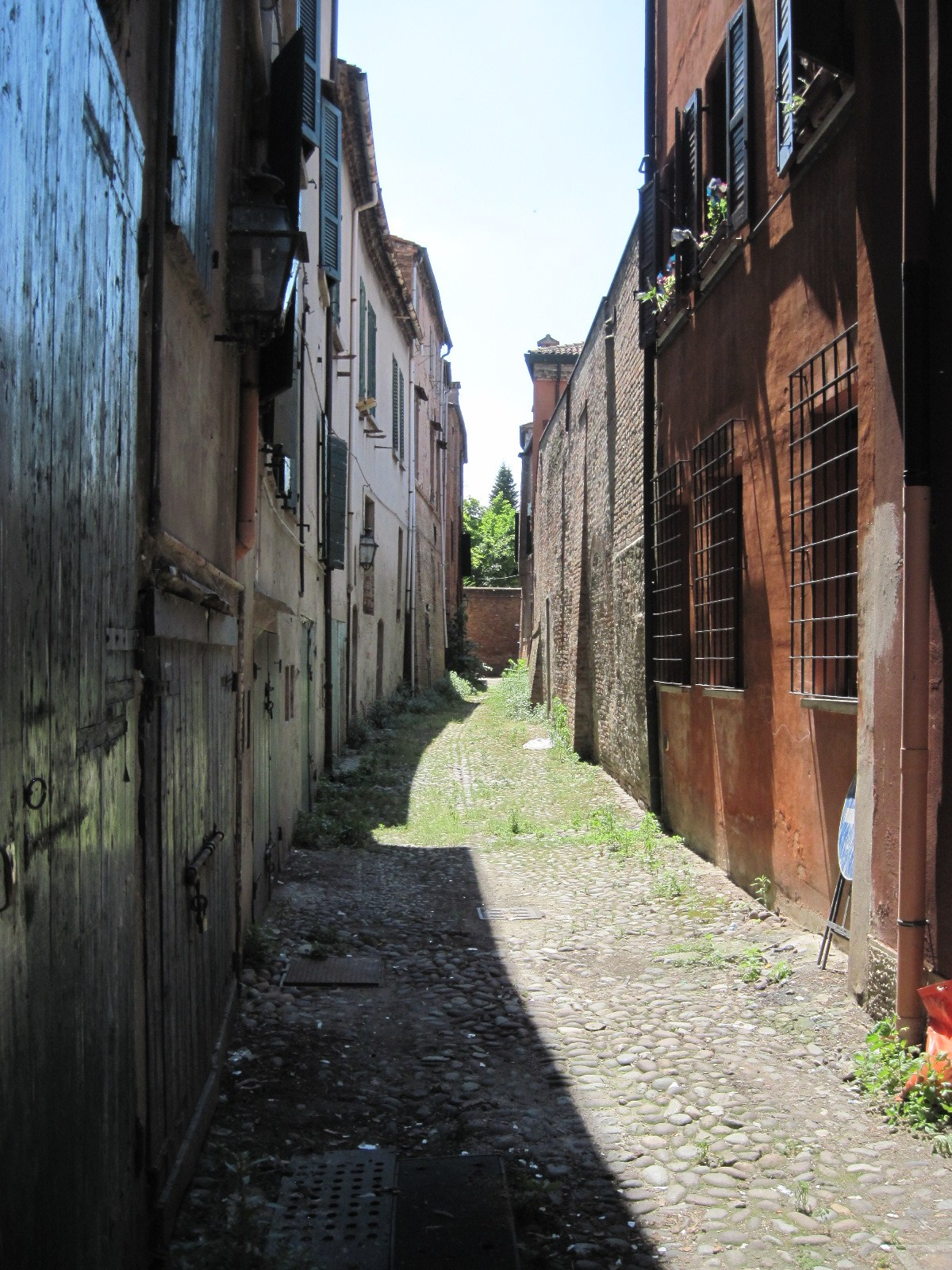 Vicolo dei Duelli 5